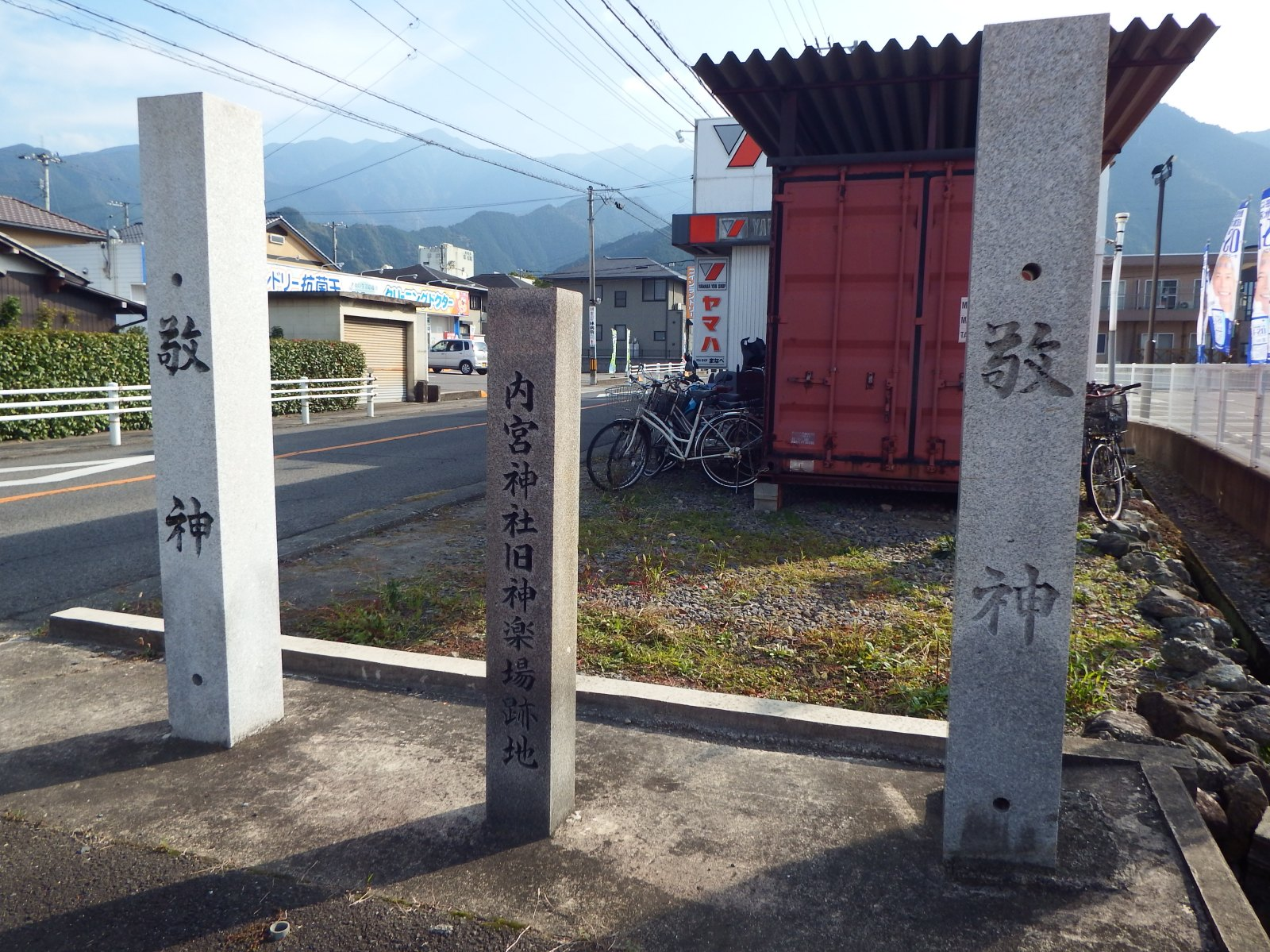 内宮神社の跡